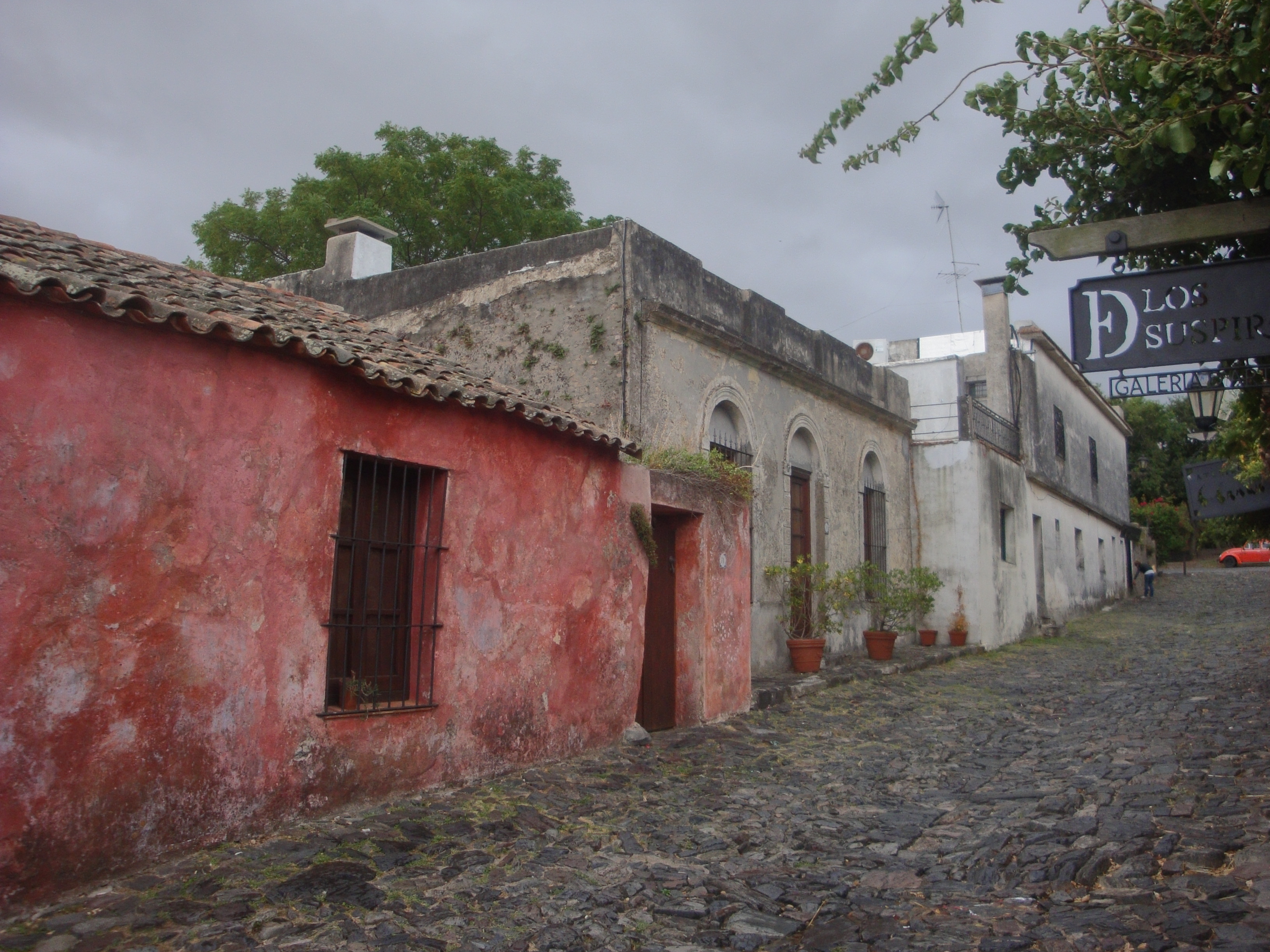 Calle de los Suspiros, Colonia del Sacramento.